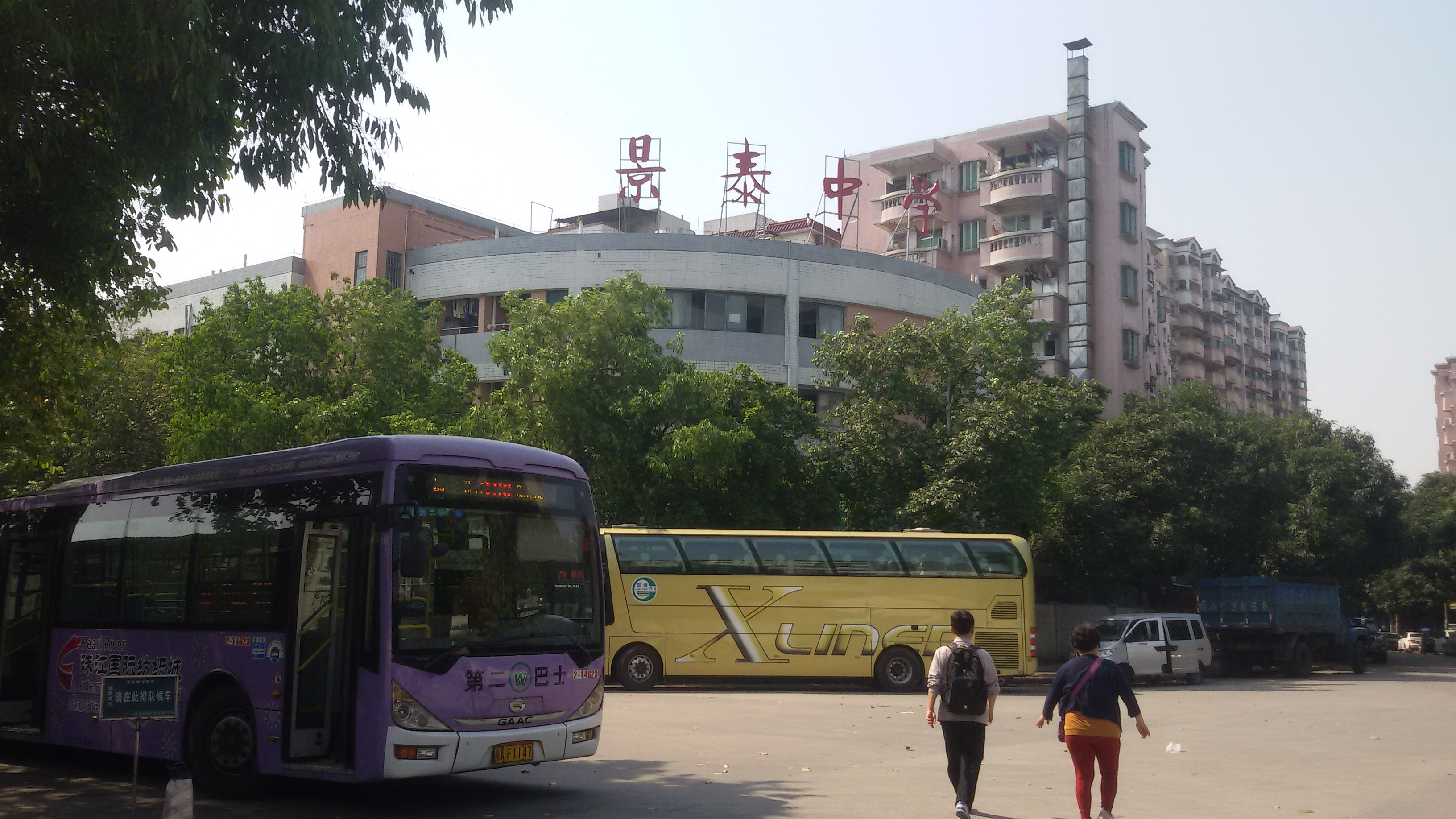 粵語: 白雲區景泰中學嘅東邊飯堂樓